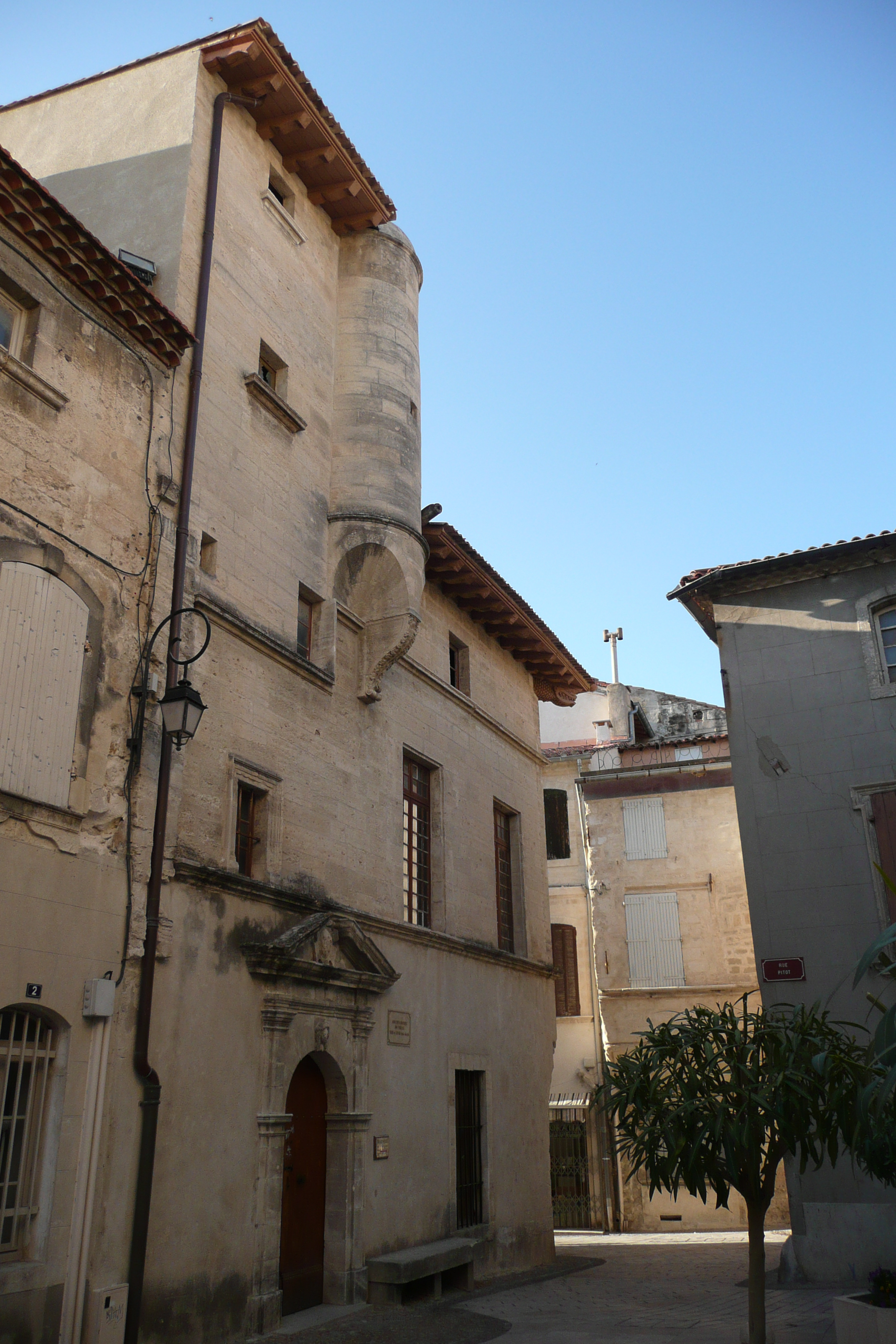 Ancien hôtel de ville 13 à 17 ème siècle en Aramon.